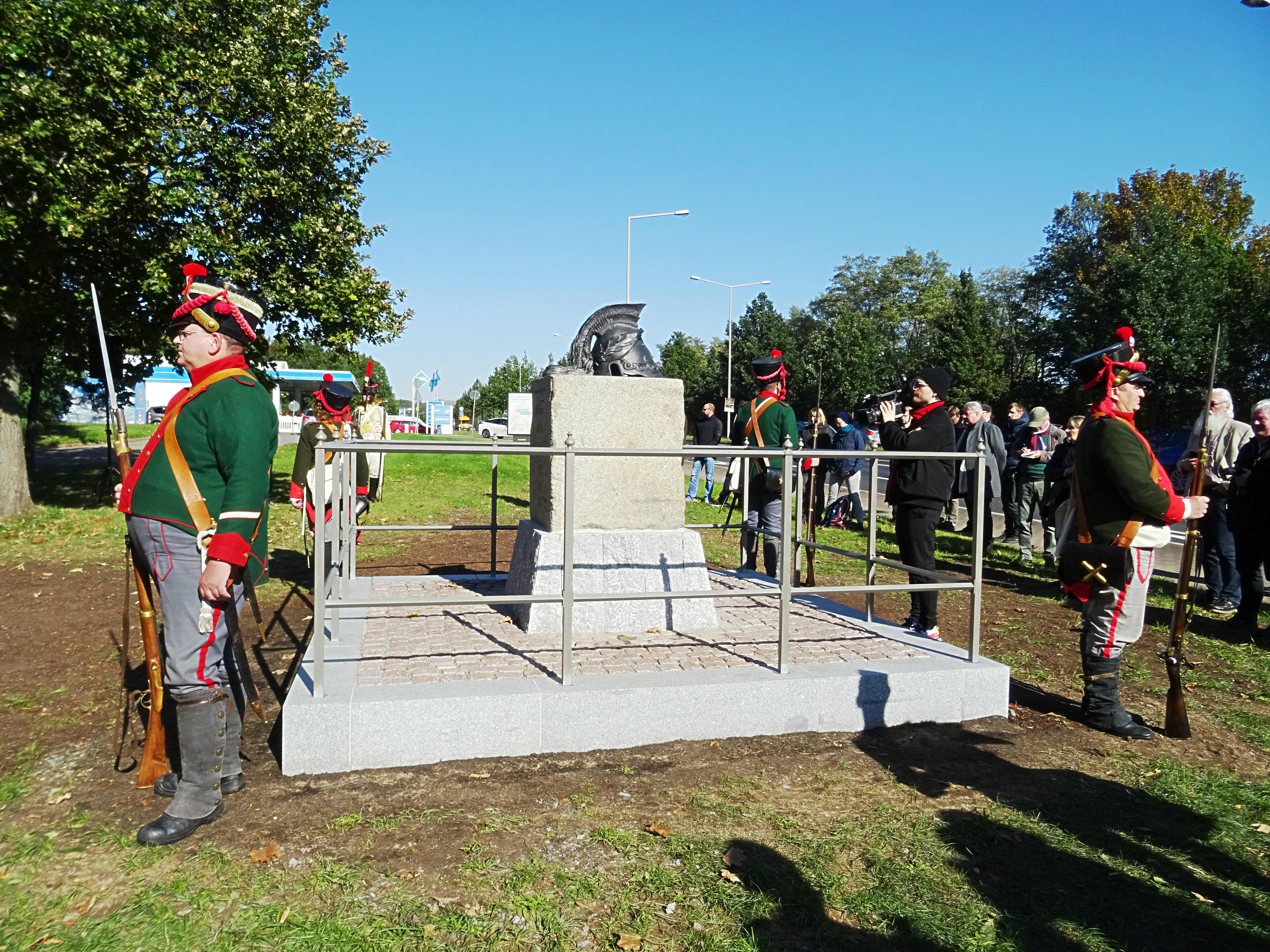 Dresden, Hauptmann Hirsch-Denkmal. Einweihung am 07. Oktober 2019. Maßgeblichen Anteil haben die Firmen Berufliche Trainingszentren Dresden der SRH Berufsbildungswerk Sachsen GmbH Dresden, Steinbildhauer- und Steinmetzwerkstatt Andreas Hempel mit ausführenden Bildhauerleistungen und der Kunstgießerei Gebr. Ihle und weitere.Weitere Förderer sind das Landesamt für Denkmalpflege Sachsen, der St. Heinrichs Orden zu Bamberg e.V. und das Militärhistorische Museum der Bundeswehr. Die Sponsoren stellten rund 30.000 Euro zur Verfügung. Hinzu kommen noch die Eigenleistung von über eintausend Teilnehmerstunden. Königlich-sächsischen Artillerieeinheit flankiert das Denkmal.